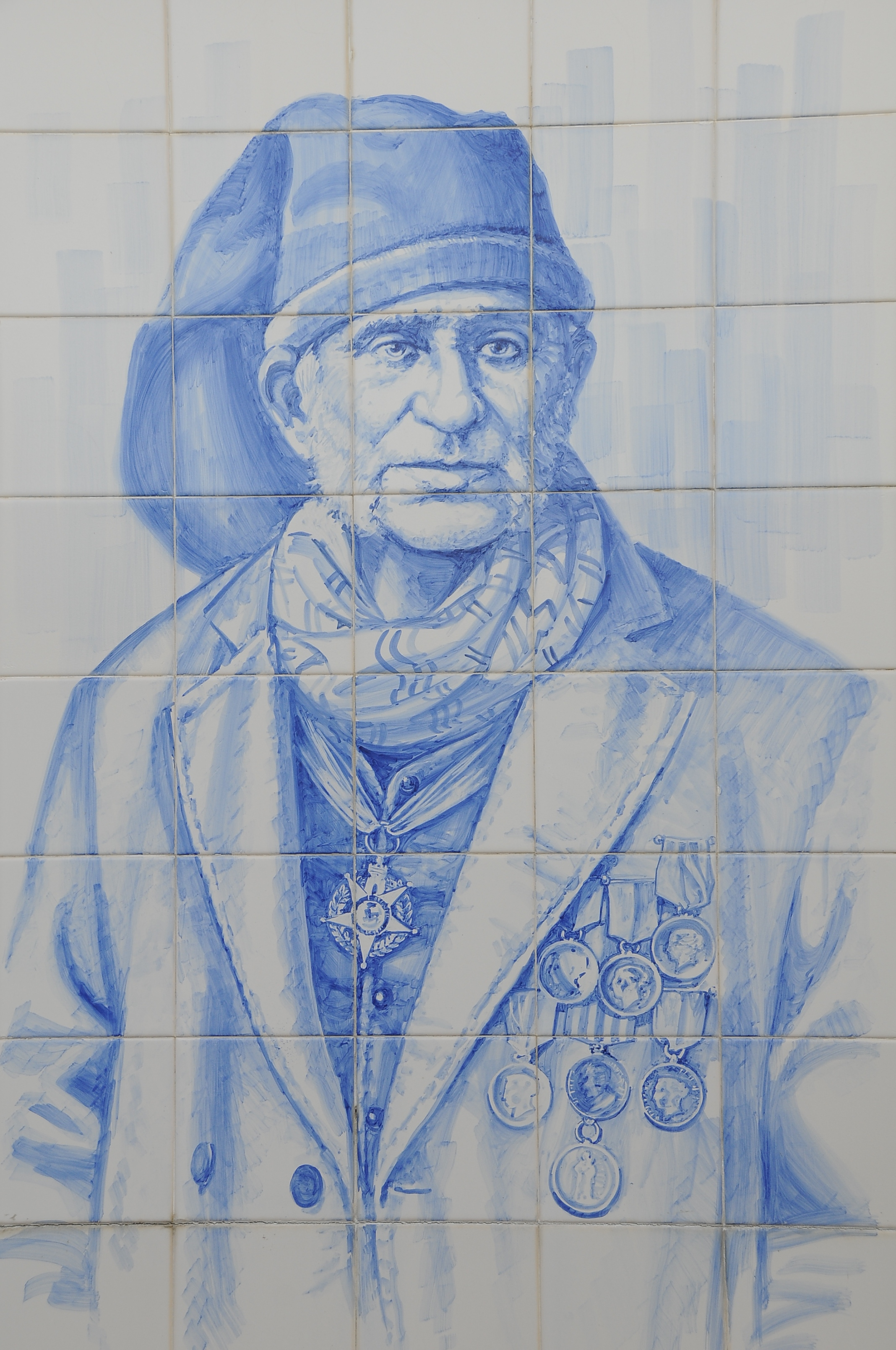 Cego do Maio in Póvoa de Varzim, Portugal